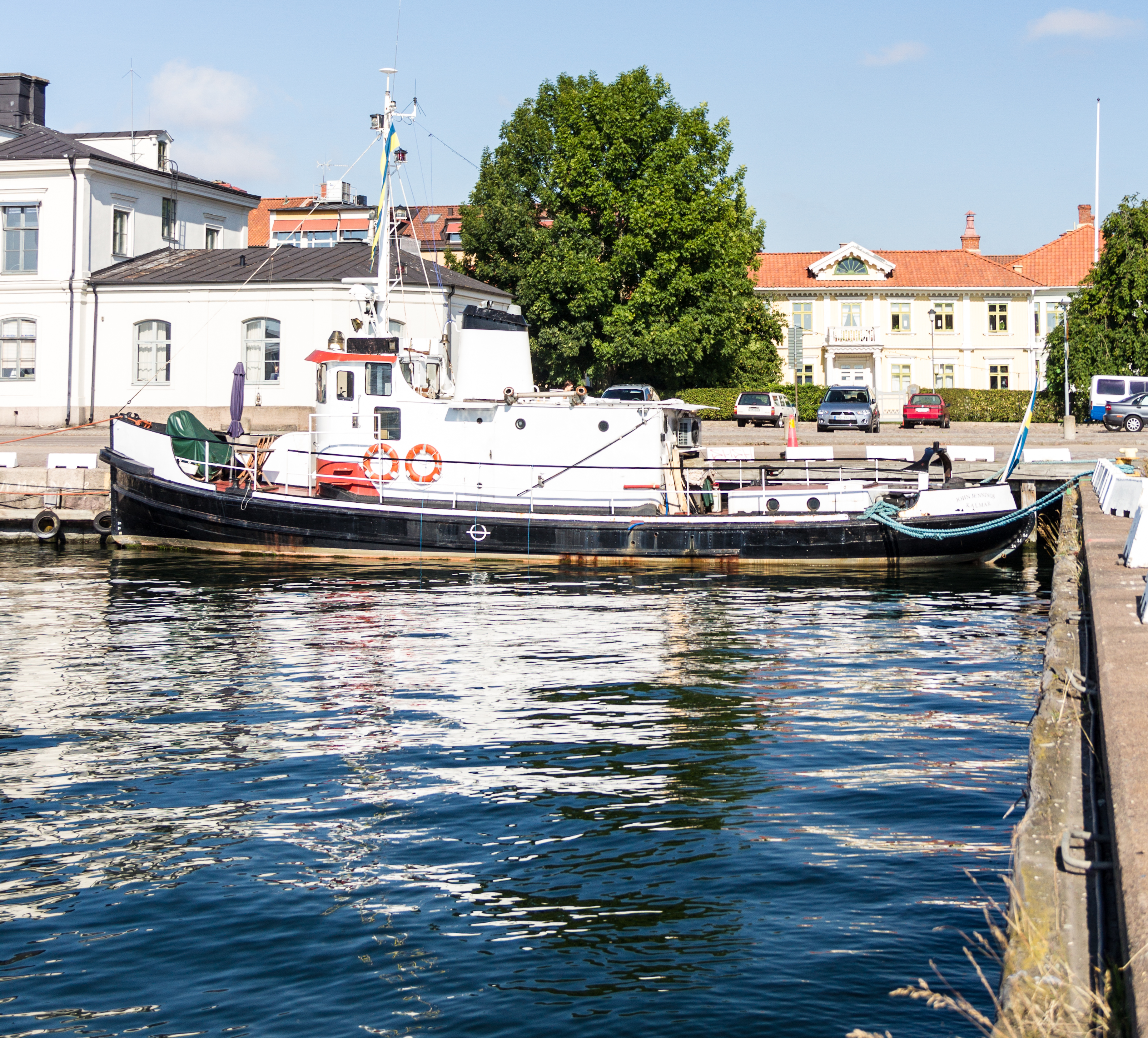 John Jennings (1920) This is an image of a protected Swedish ship, with call sign SHMA .